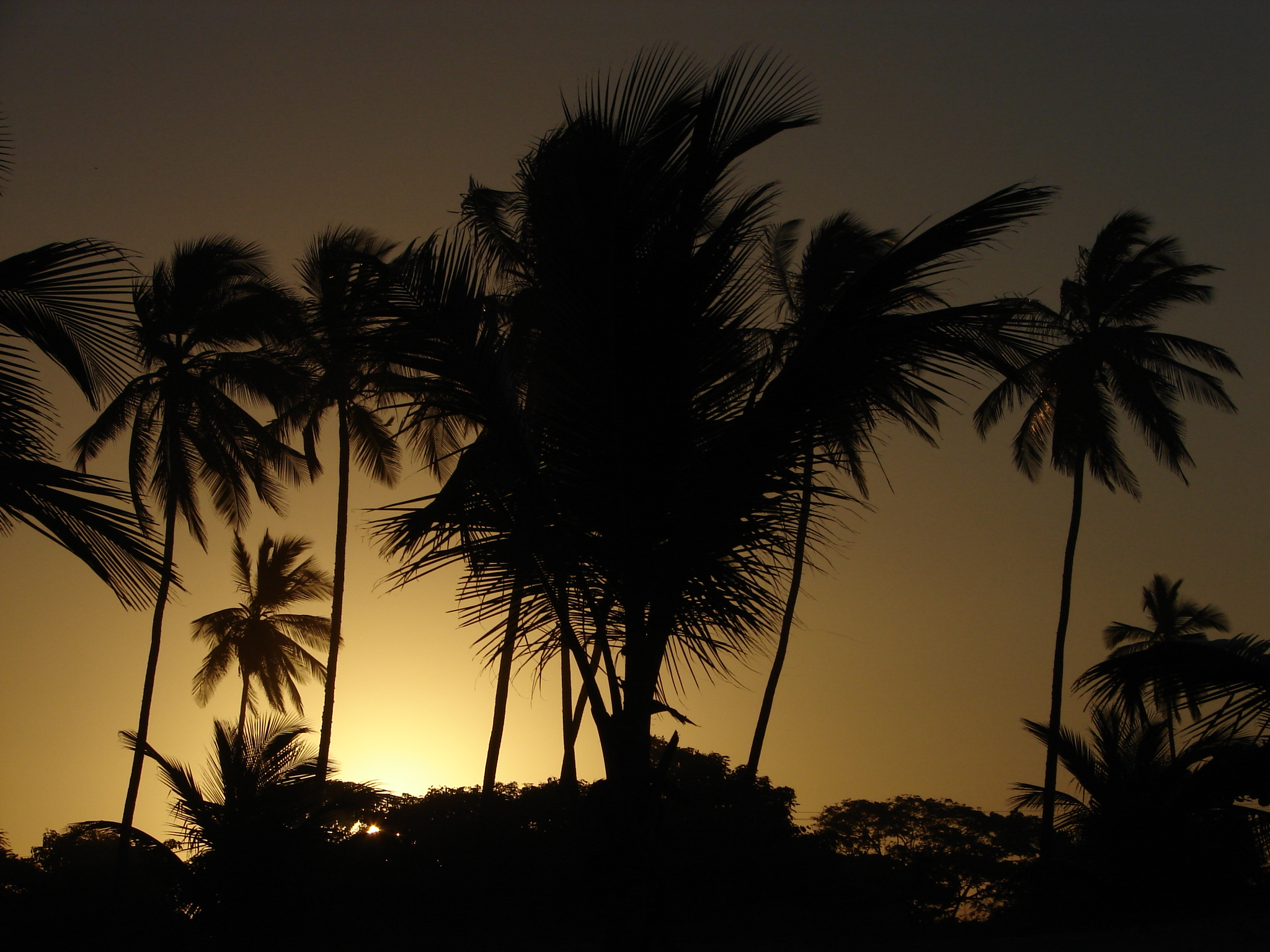 Por do sol em IlhéusIlheus - BA